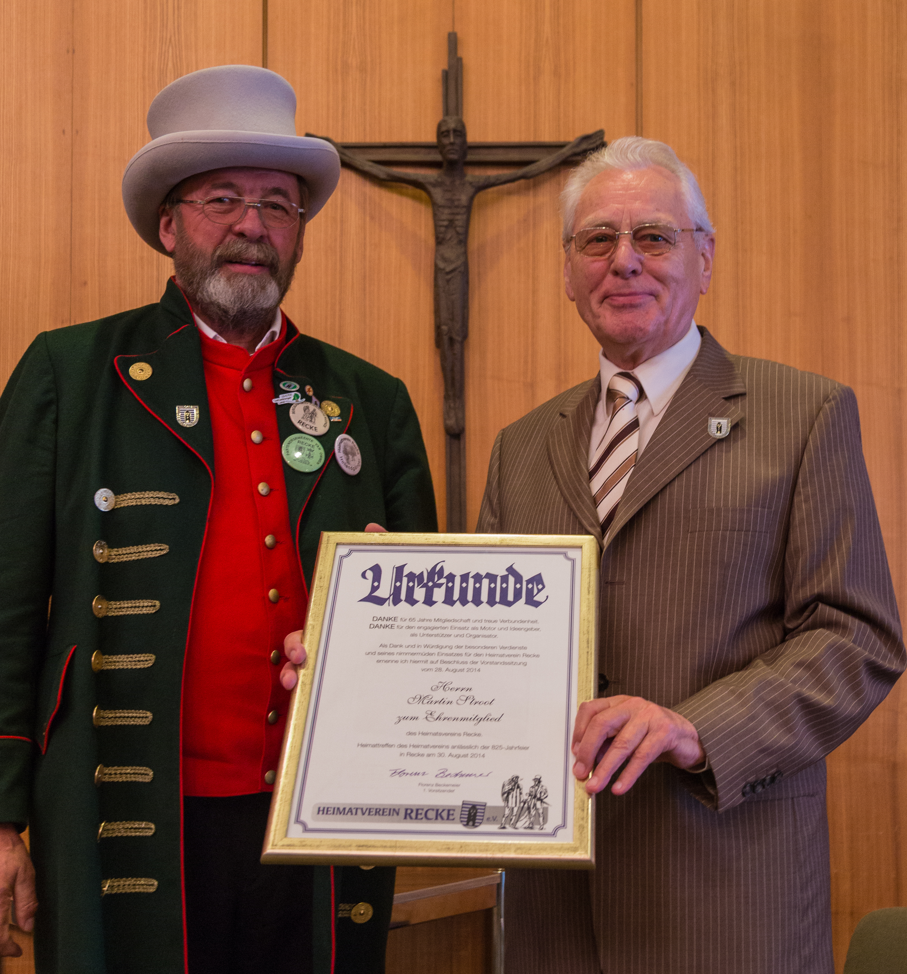 Festakt des 14. Recker Heimattreffens im Bürgersaal des Rathauses von Recke, Kreis Steinfurt, Nordrhein-Westfalen, Deutschland. Das Heimattreffen war integraler Bestandteil der 825-Jahr-Feier der Gemeinde Recke. Hier überreicht Florenz Beckemeier (links, in Töddentracht), 1. Vorsitzender des Heimatvereins Recke, die Urkunde über die Ehrenmitgliedschaft an Altbürgermeister und -landrat Martin Stroot (rechts), ebenfalls im Führungsgremium des Heimatvereins Recke und seit 1949 dessen Mitglied.